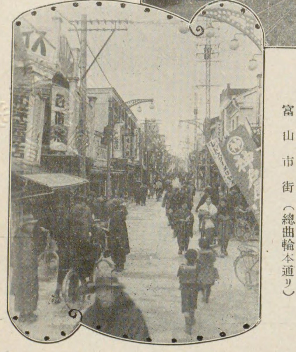 富山市街（総曲輪本通り）